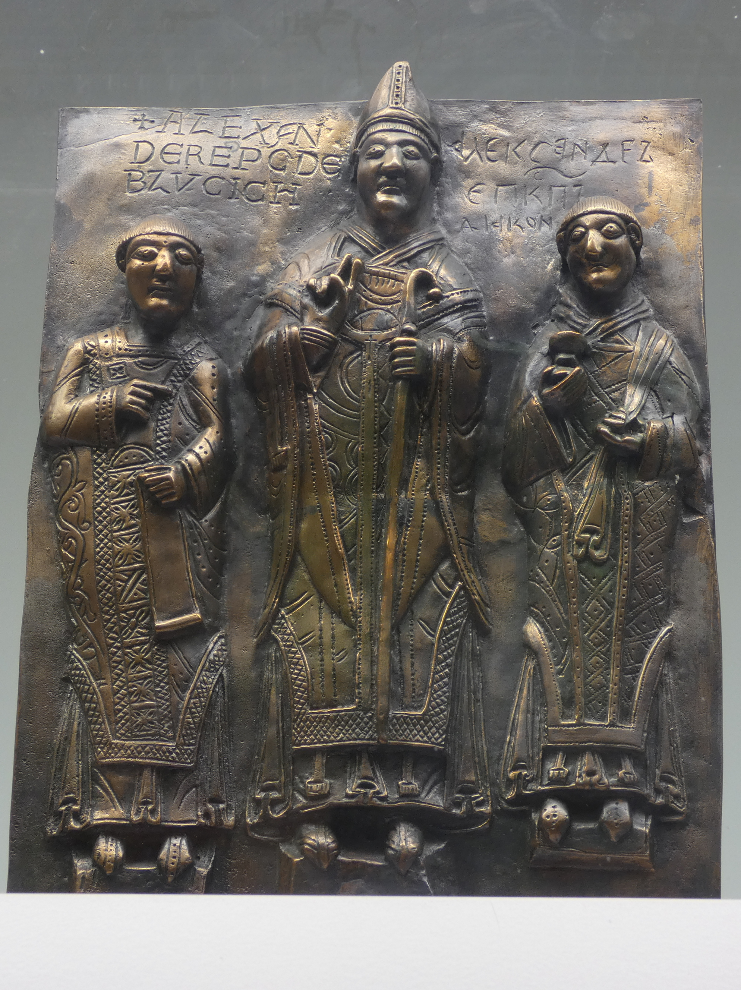 Ausschnitt aus linkem Türflügel der Bronzetür, welche sich ehemals in der Kathedrale von Płock befand und später in die Sophienkathedrale von Novodrod umgesetzt wurde; Darstellung von Bischof Alexander von Płock bzw. Alexander von Malonne und zweier Diakone, gefertigt in Magdburg; Kunsthistorisches Museum Magdeburg